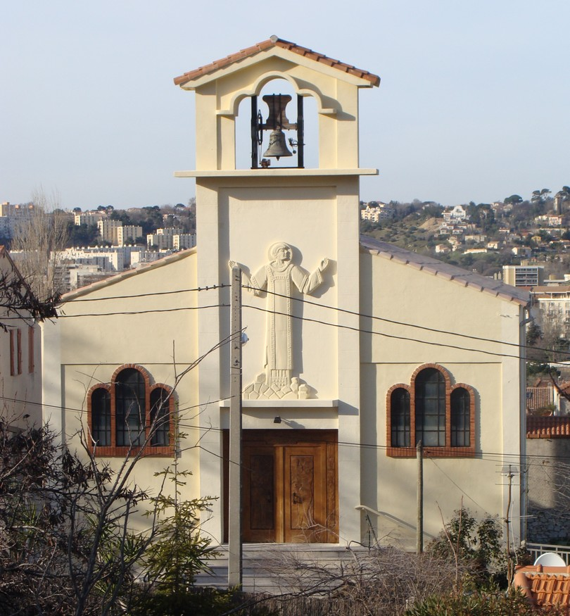 L'église de la Valbarelle, dans le 11e arrondissement de Marseille.